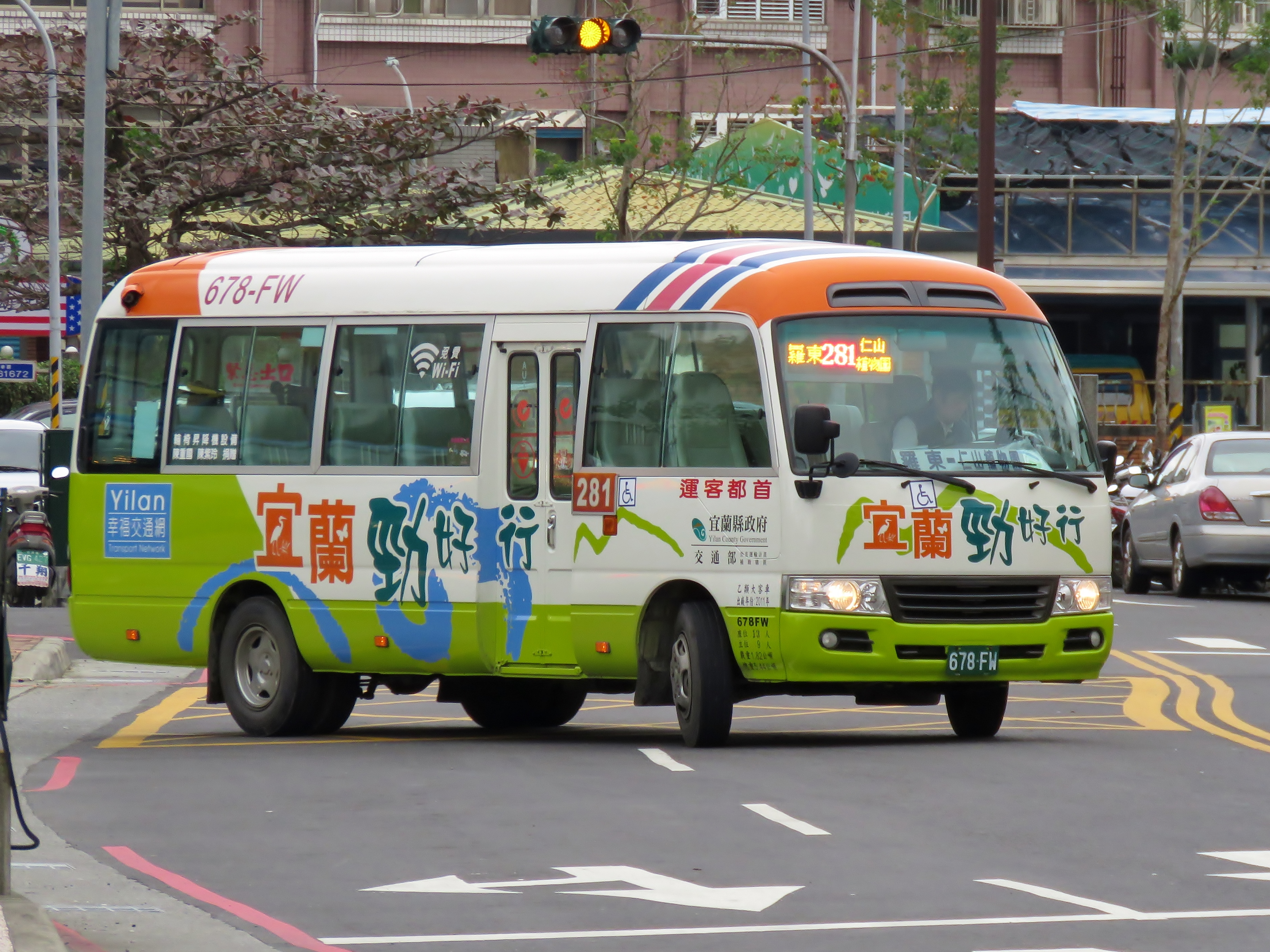 2012 Toyota Coaster XZB50L-ZEMSYR 宜蘭縣轄公車 281 678-FW